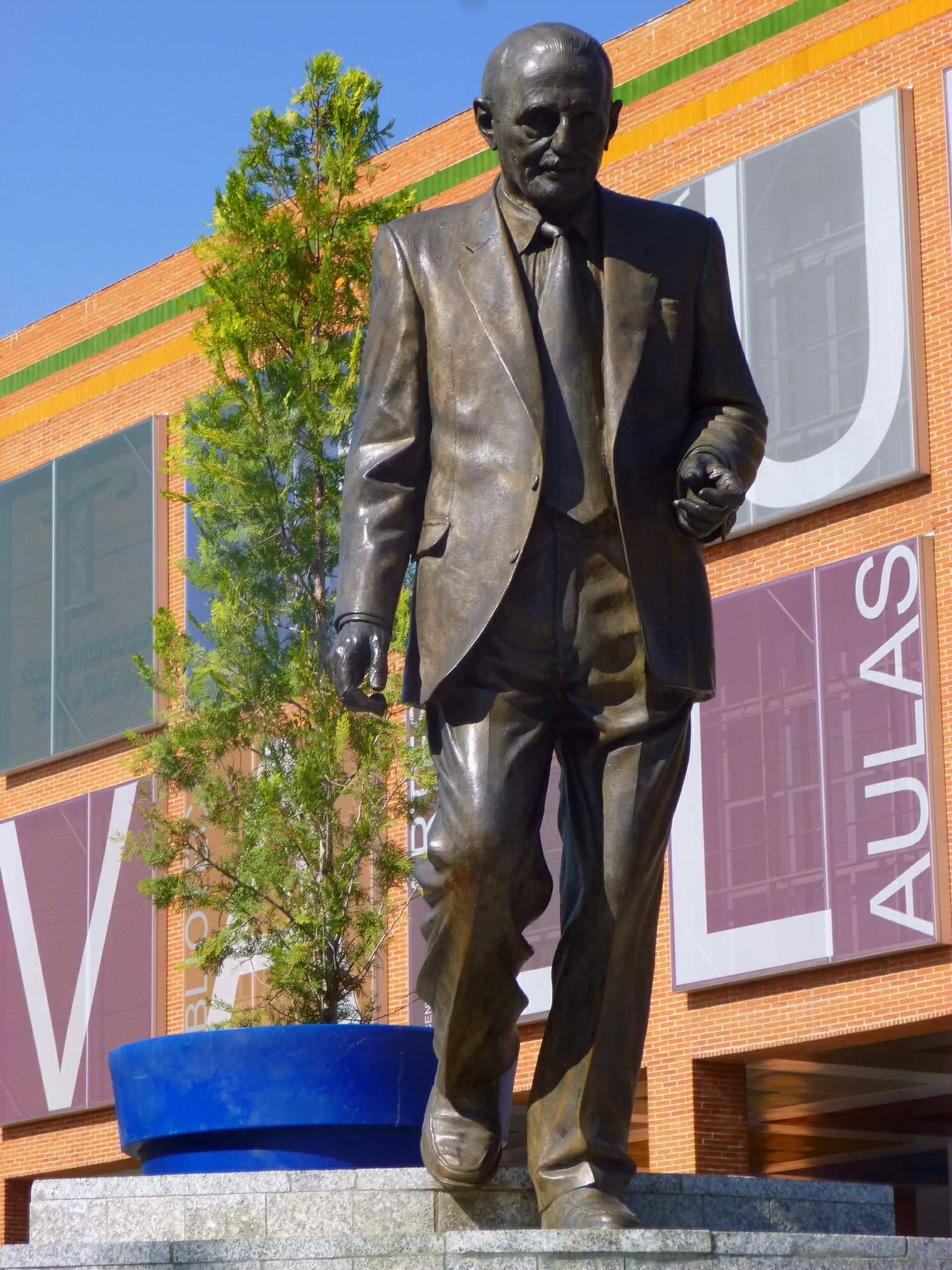 Centro Cultural Buero Vallejo (anteriormente llamado Centro Municipal de las Artes y Teatro Buero Vallejo), en Alcorcón (Madrid)